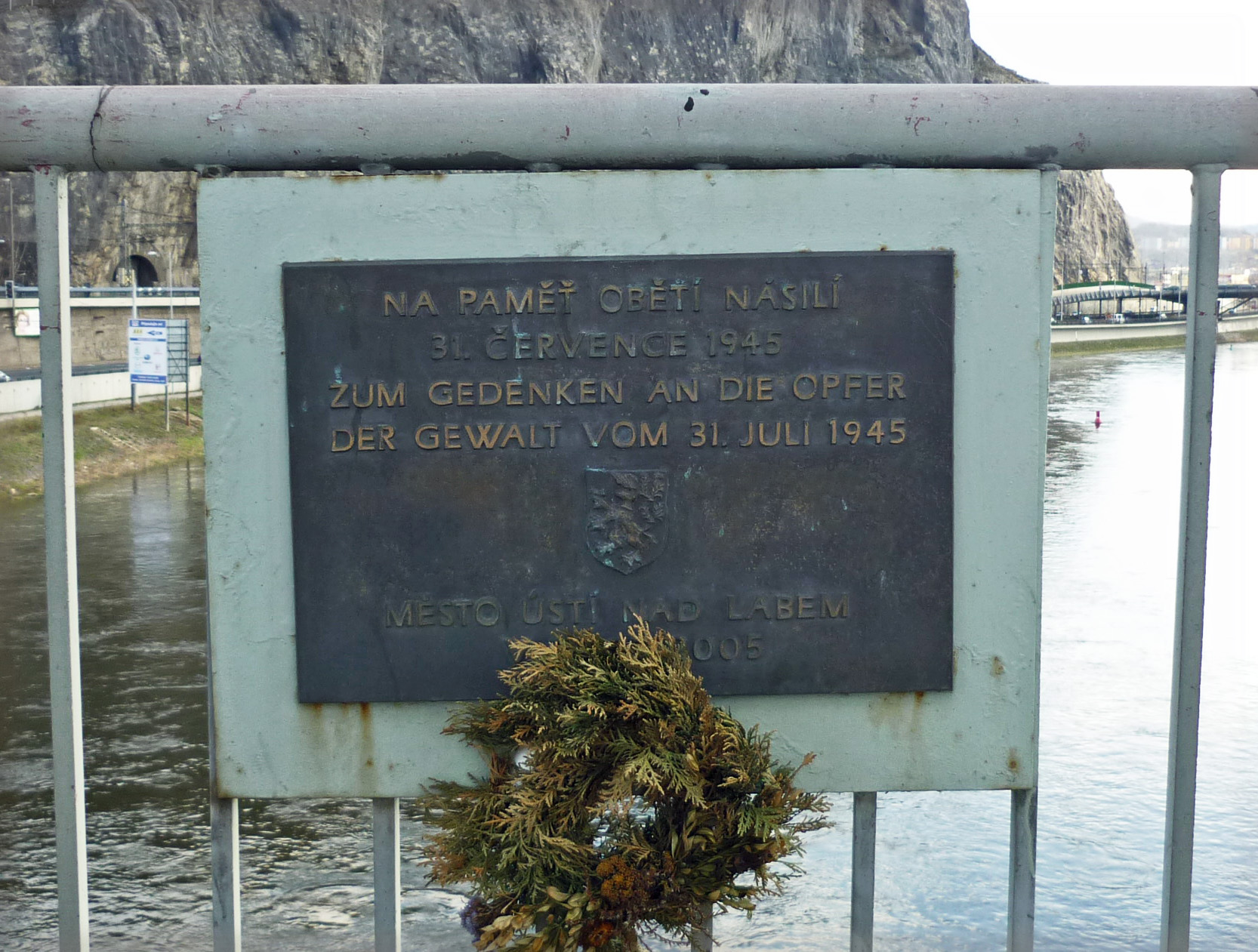 Gedenktafel an das Massaker von Aussig auf der Edvard-Beneš-Brücke in Aussig (Ústí nad Labem) im Jahr 1945